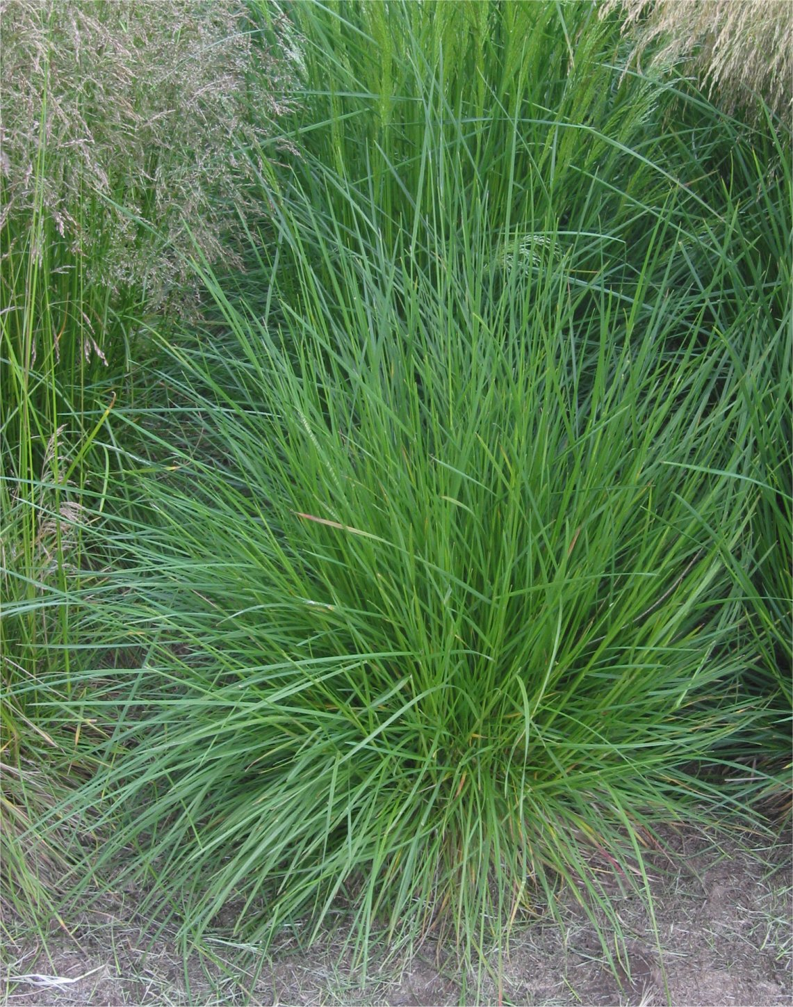 (Ruwe smele plant) Deschampsia cespitosa